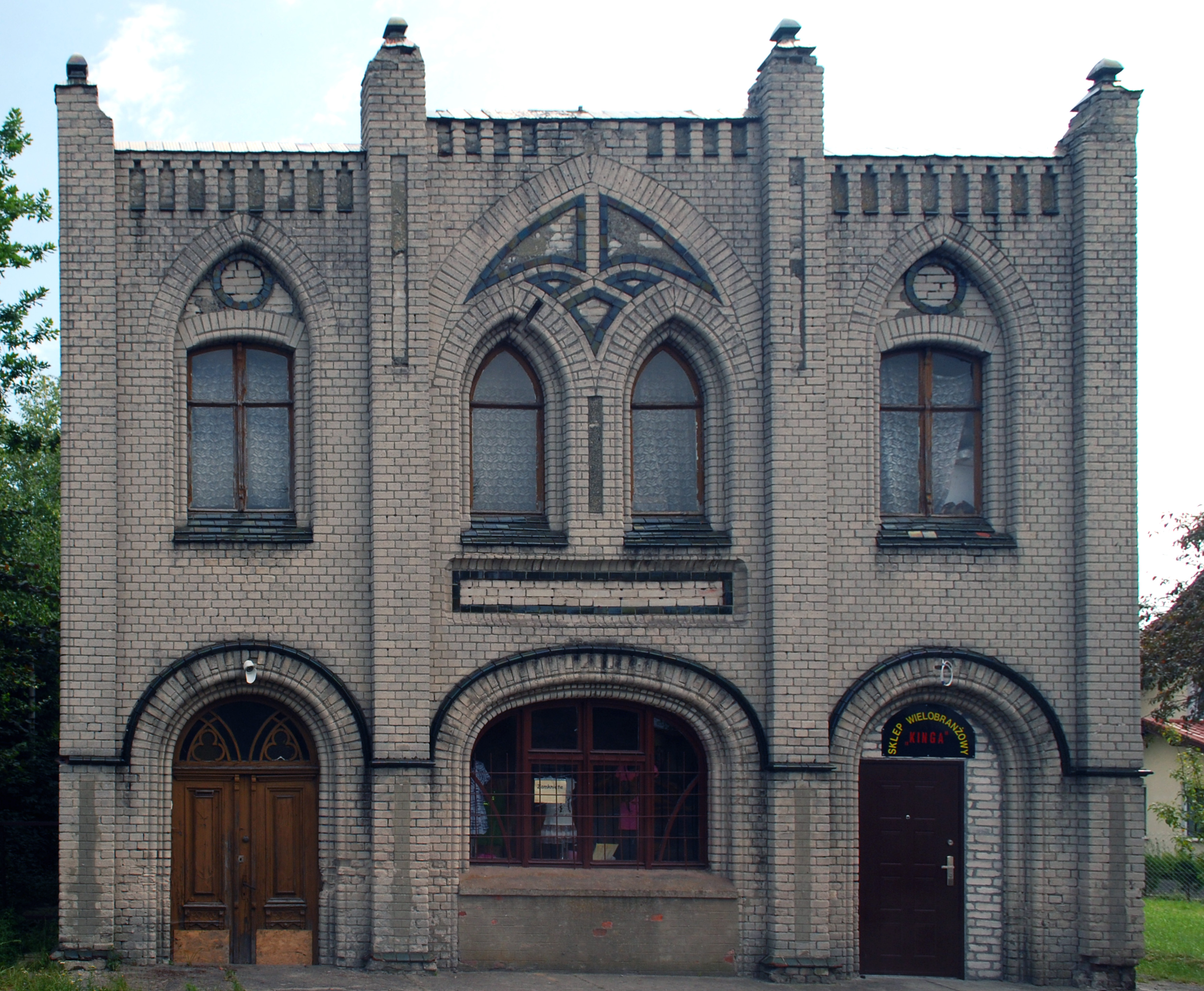 Stary zbór mennonicki w Tujsku przekształcony w sklepy.